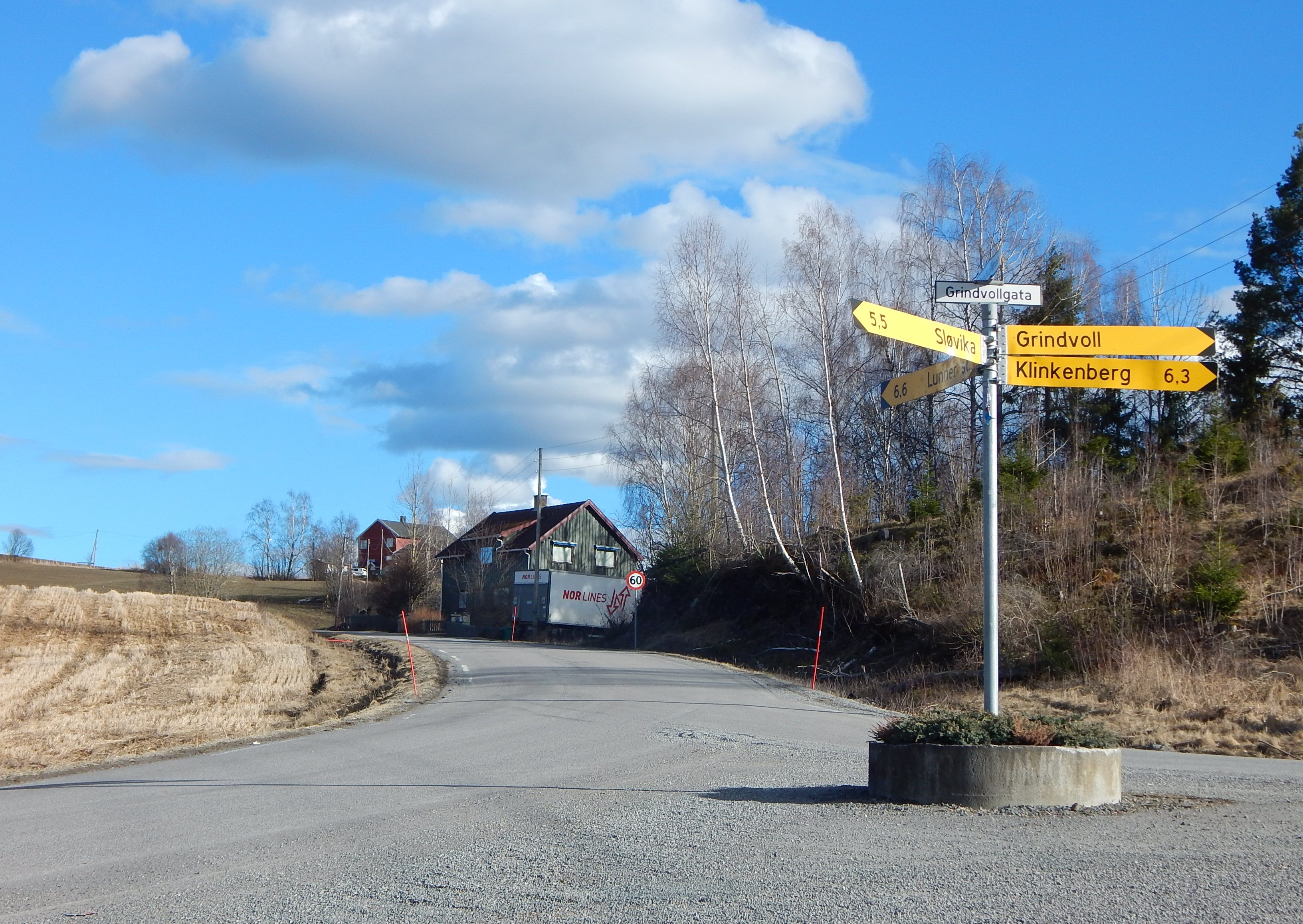 Grindvollinna (fylkesvei 2278, tidl. FV3) ved krysset med Grindvollgata